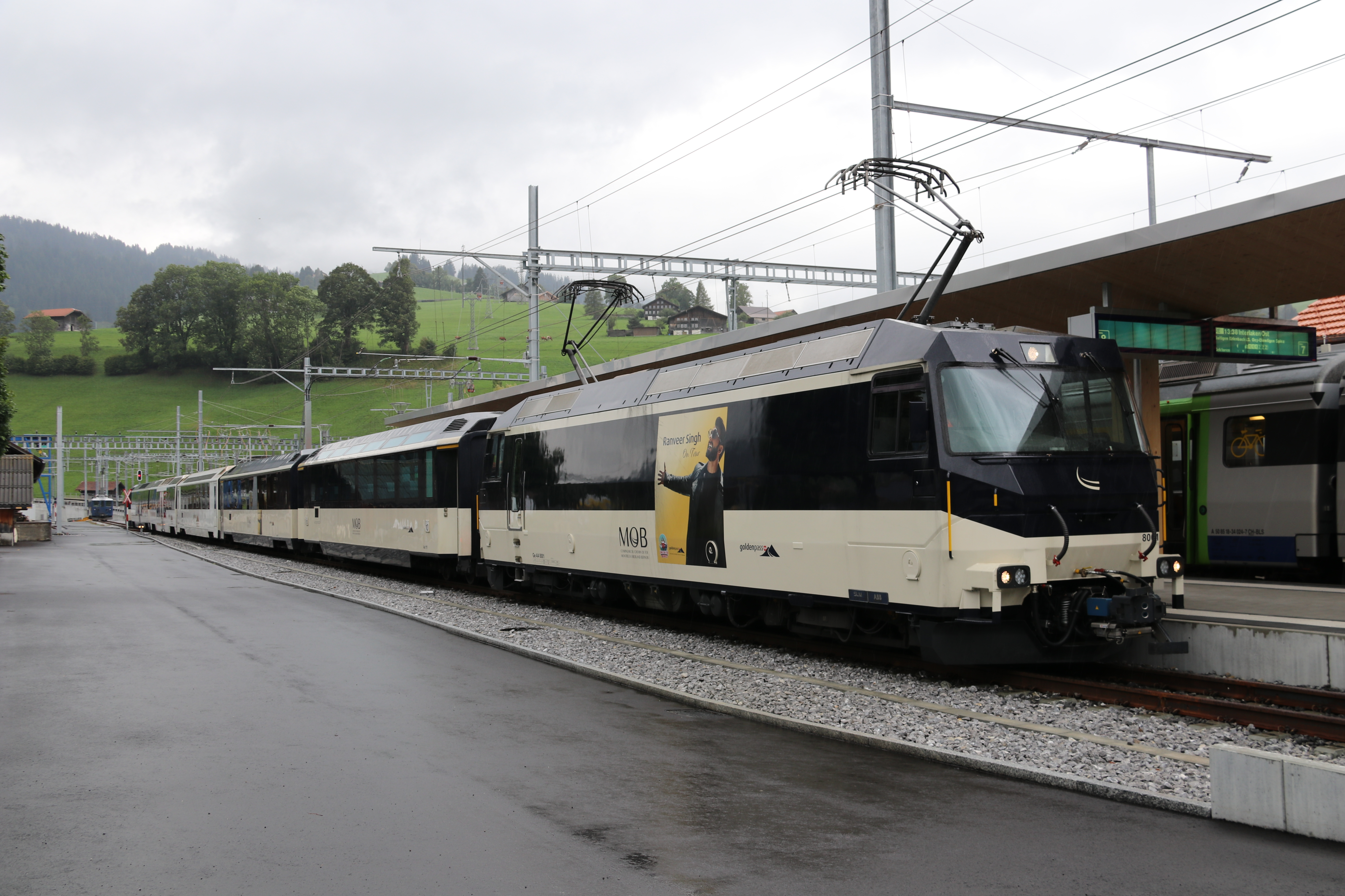 Panoramic-Express der MOB, soeben im Bahnhof zweisimmen angekommen, bestehend aus den Fahrzeugen (von links nach rechts) Bs 238-Bs 235-Bs 231-Bs 221-As 114-As 111-Ge 4/4 8001. Alle Fahrzeuge sind mit der automatischen Schwab-Kupplung ausgerüstet.